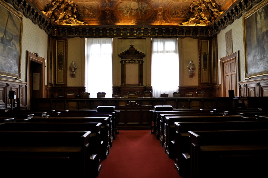 Tribunal de commerce de Paris, grande salle d'audiance. Photo prise lors des journées européennes du patrimoine